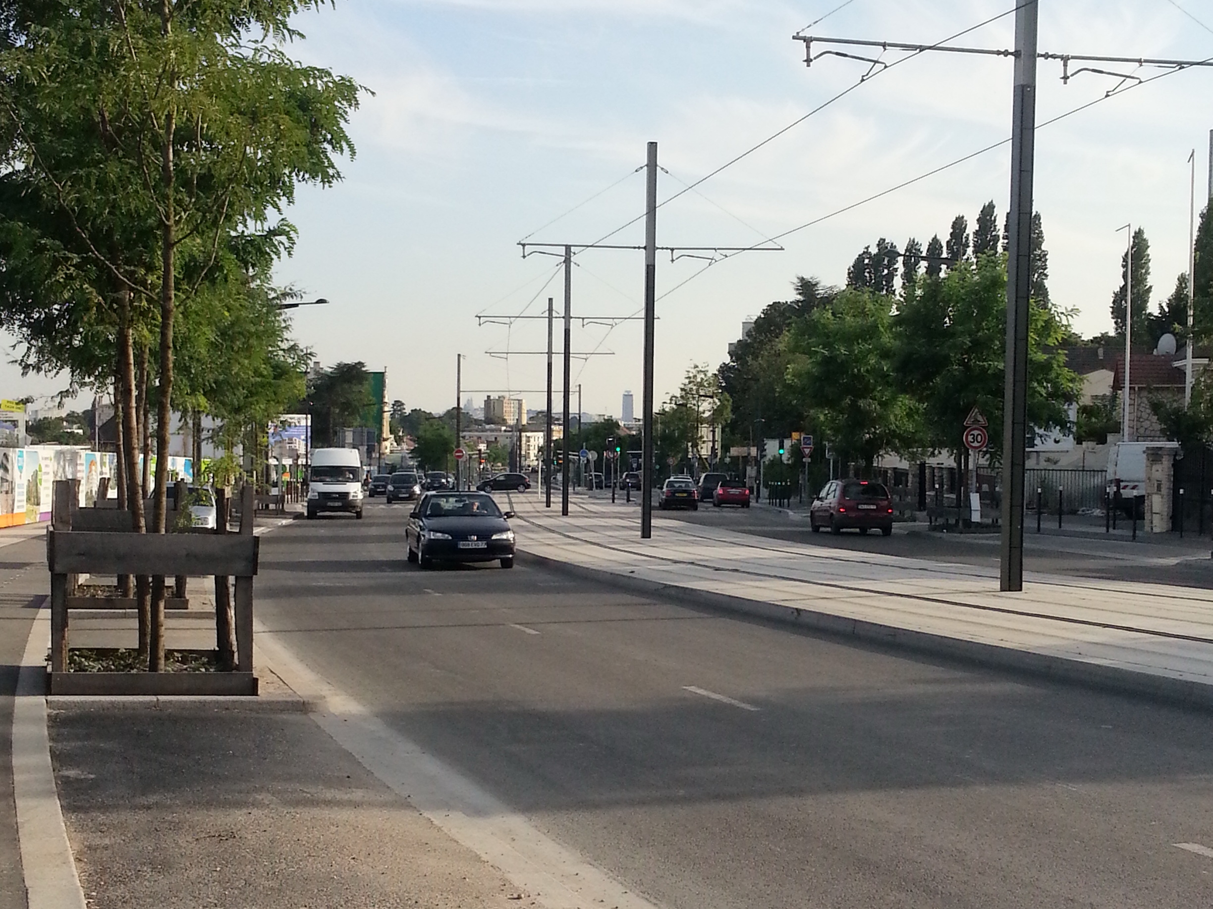 Plate-forme de T5 au centre de la RN1, près de la station Jacques-Prévert à Pierrefitte. Au loin, la Tour Pleyel et le Sacré-cœur